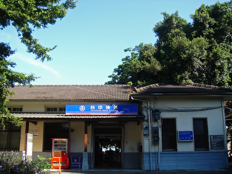 中文（台灣）: 臺灣鐵路管理局臺中車站後站，原臺灣糖業鐵路中南線中南站。